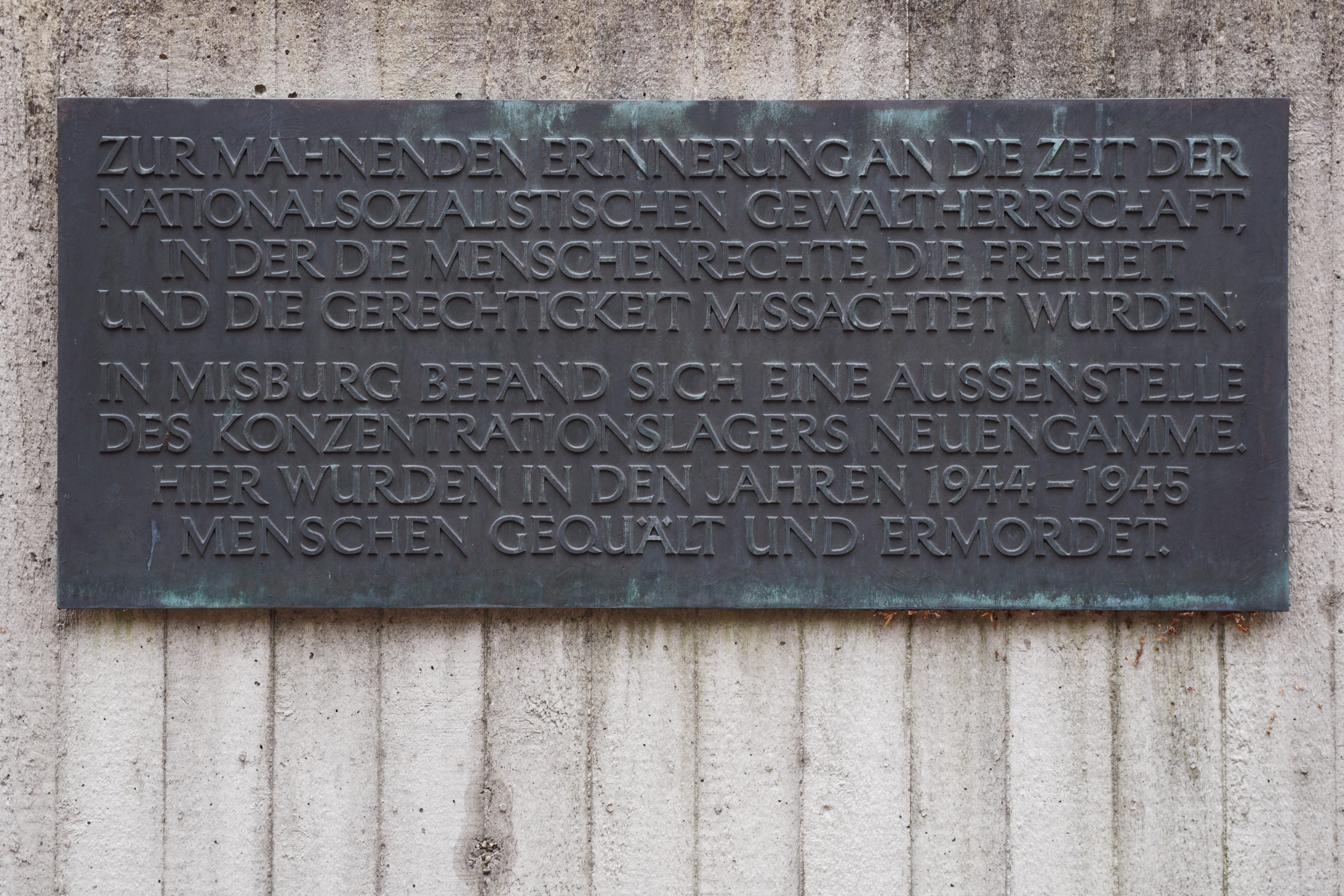 Gedenktafel für das KZ-Außenlager Hannover-Misburg auf dem Stadtteilfriedhof Misburg. Inscription/Inschrift: ZUR MAHNENDEN ERINNERUNG AN DIE ZEIT DER NATIONALSOZIALISTISCHEN GEWALTHERRSCHAFT, IN DER DIE MENSCHENRECHTE, DIE FREIHEIT UND DIE GERECHTIGKEIT MISSACHTET WURDEN. IN MISBURG BEFAND SICH EINE AUSSENSTELLE DES KONZENTRATIONSLAGERS NEUENGAMME. HIER WURDEN IN DEN JAHREN 1944-1945 MENSCHEN GEQUÄLT UND ERMORDET.